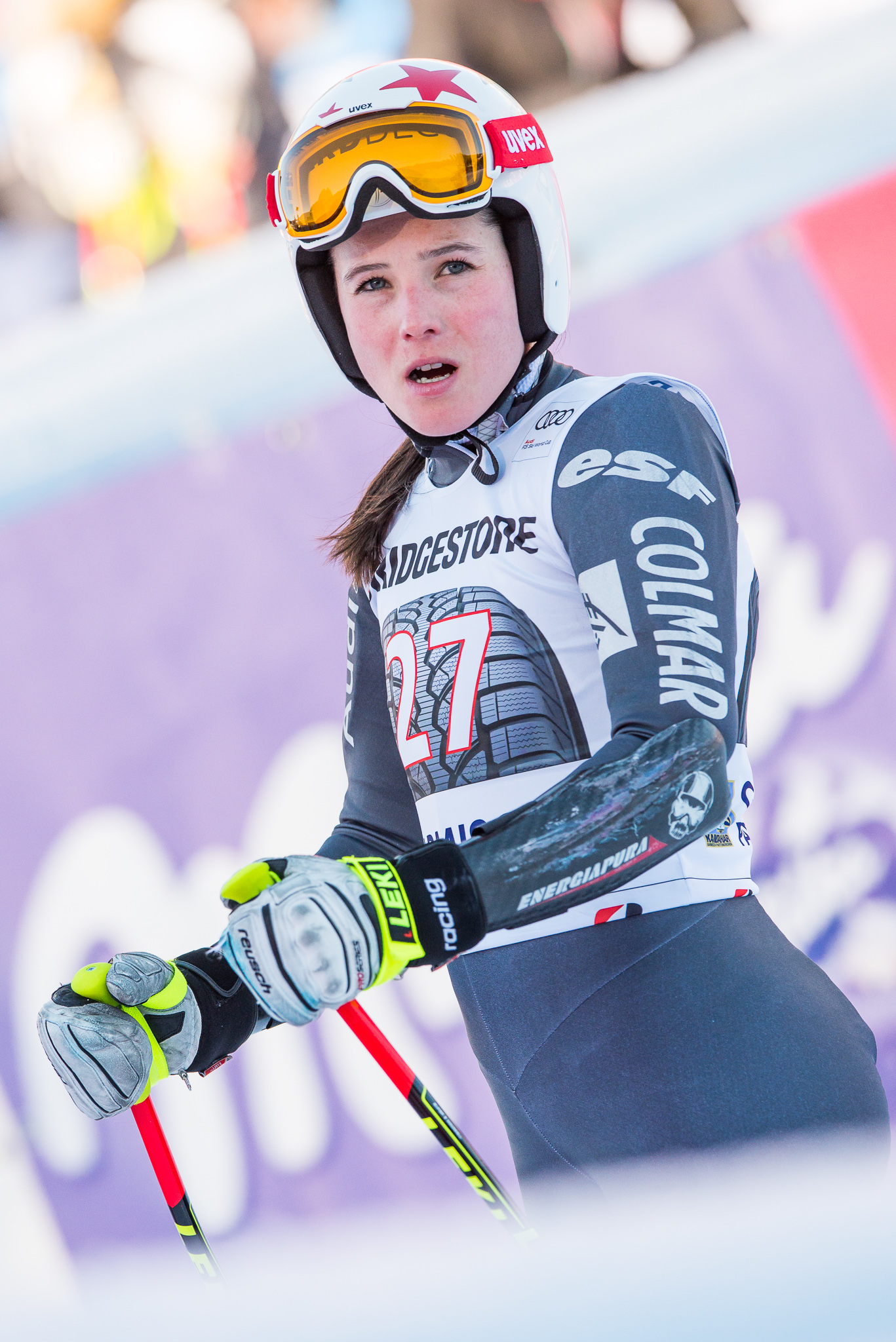 64. Kandahar Rennen,Audi FIS Ski Weltcup Garmisch-Partenkirchen,Damen Super-G,Kandahar,Ladies Super-G,Romane Miradoli